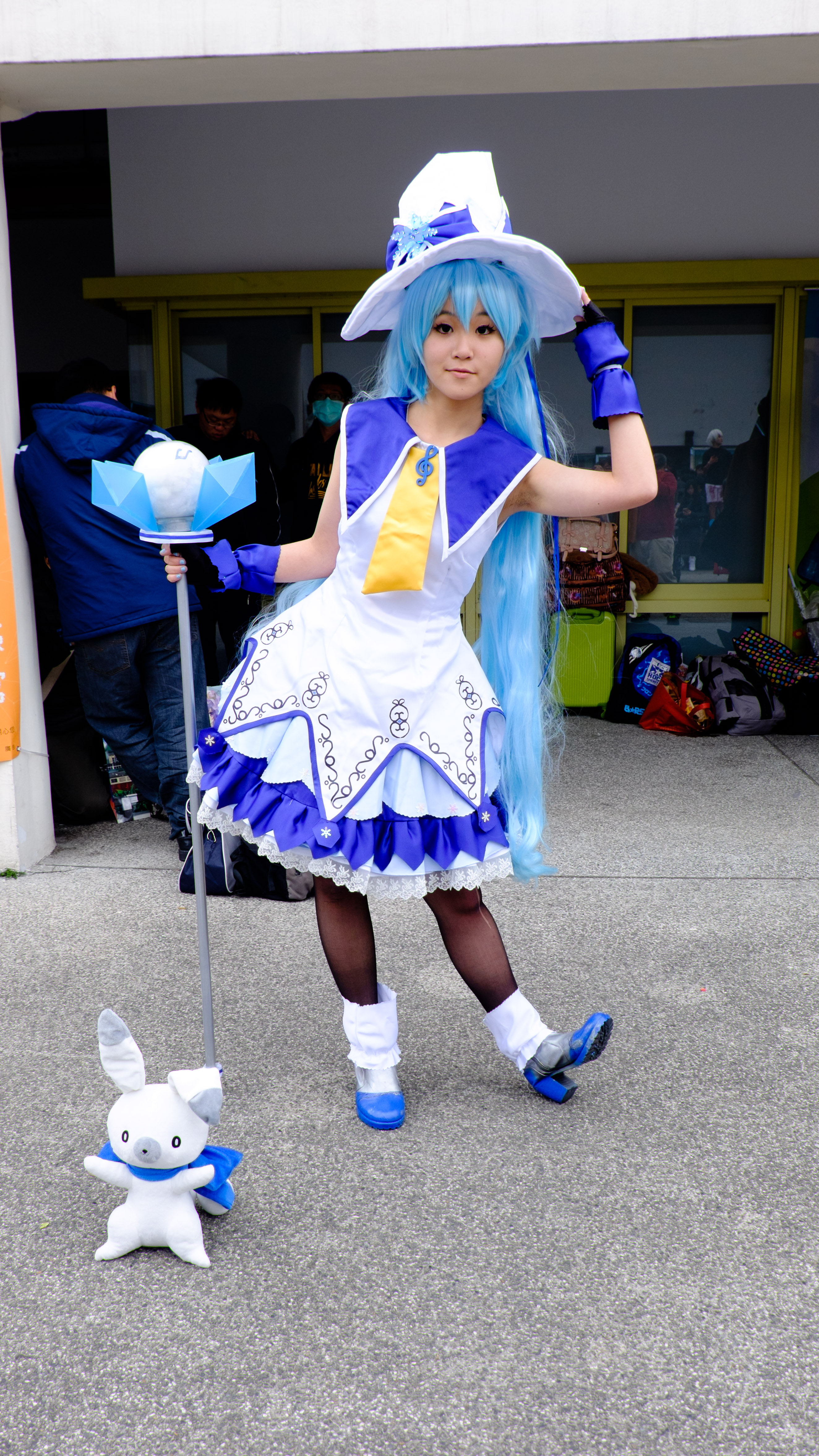 FF25第一日下午，雪初音ミク（2014 Ver.）Cosplayer。